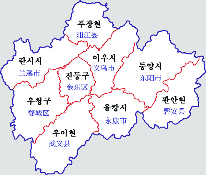 저장성 진화시 현급행정구역도